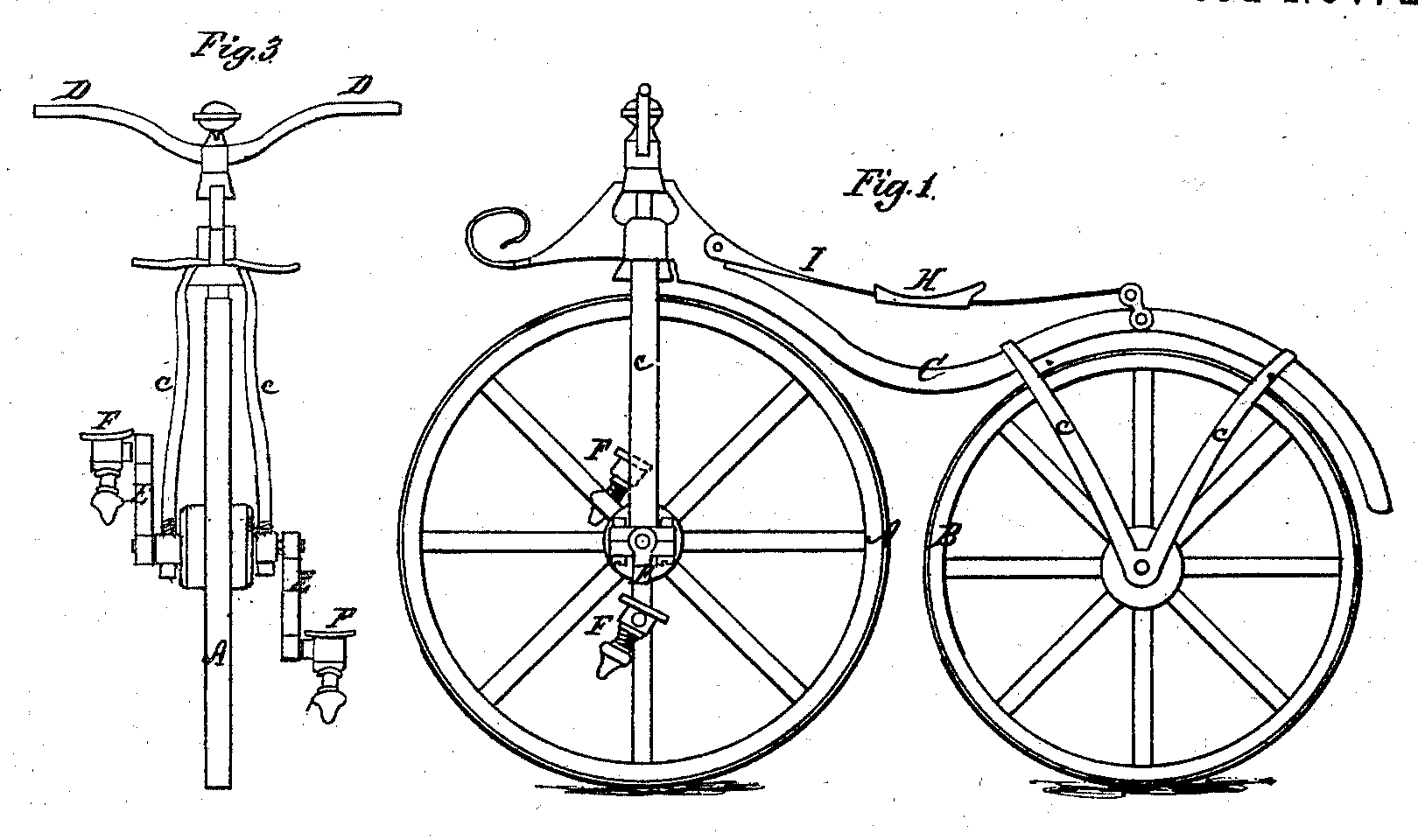 Improvement in velocipedes